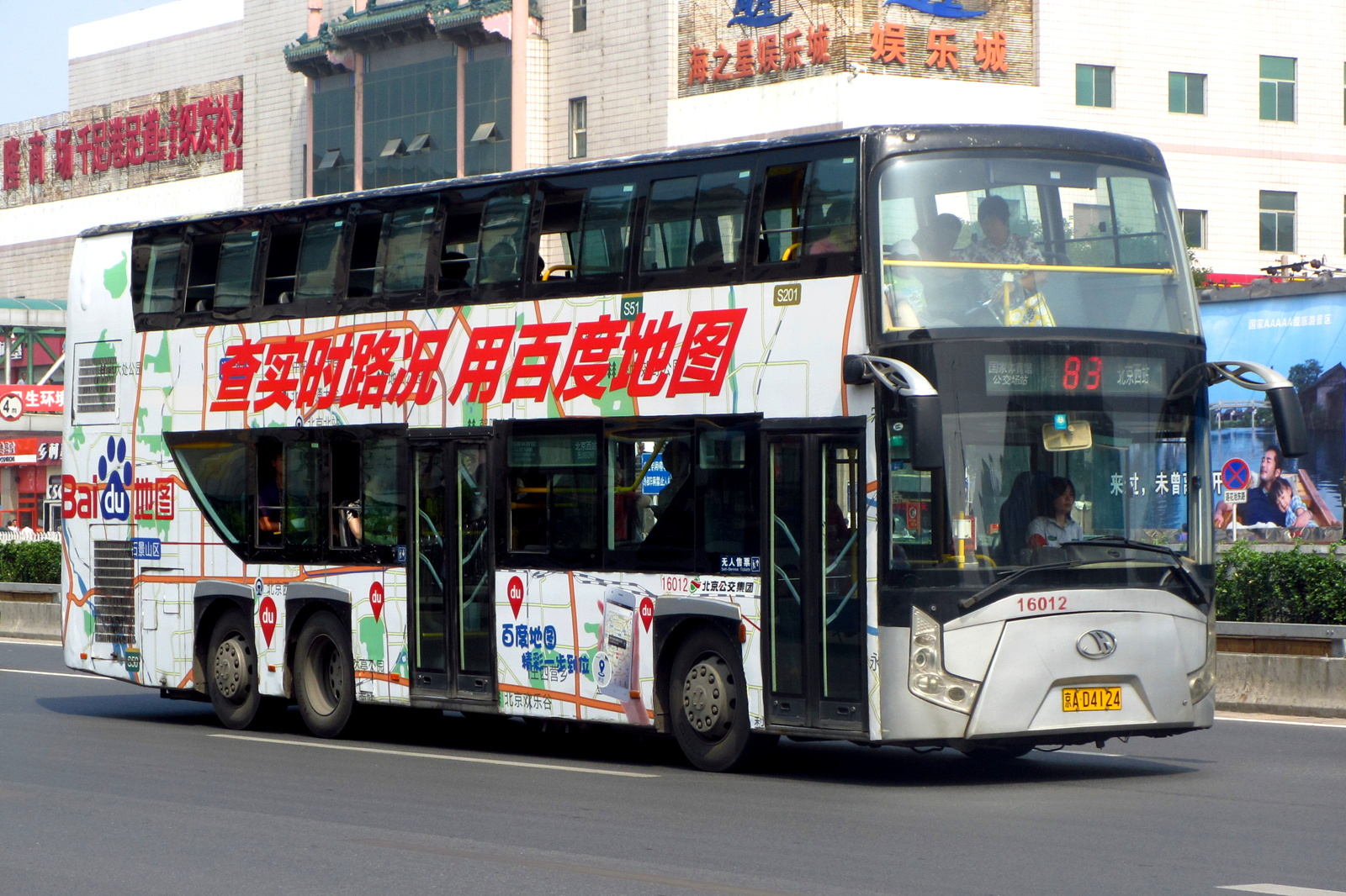 位于北京西站的83路